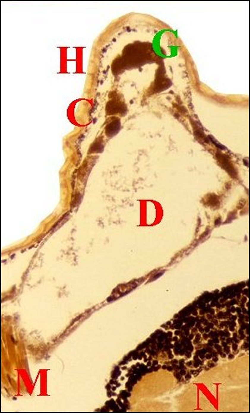 Mastophora cornigera, femelle immature : coupe histologique parasagittale du prosoma passant par une corne